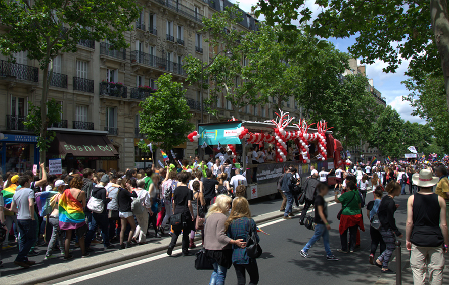 Marche des Fiertés LGBT de Paris 2013.